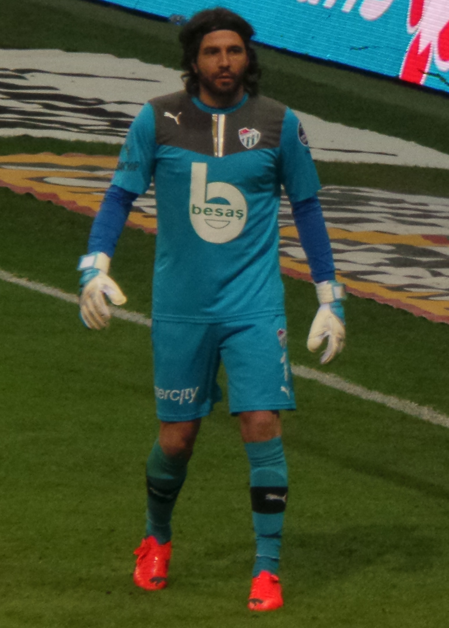 Sébastien Frey with Bursaspor